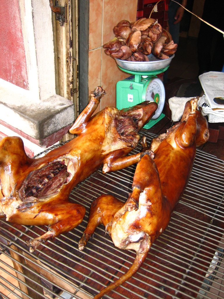 Dog Meat